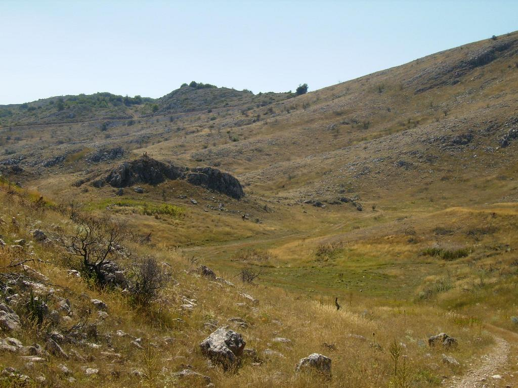 Галичица под планину Сливана